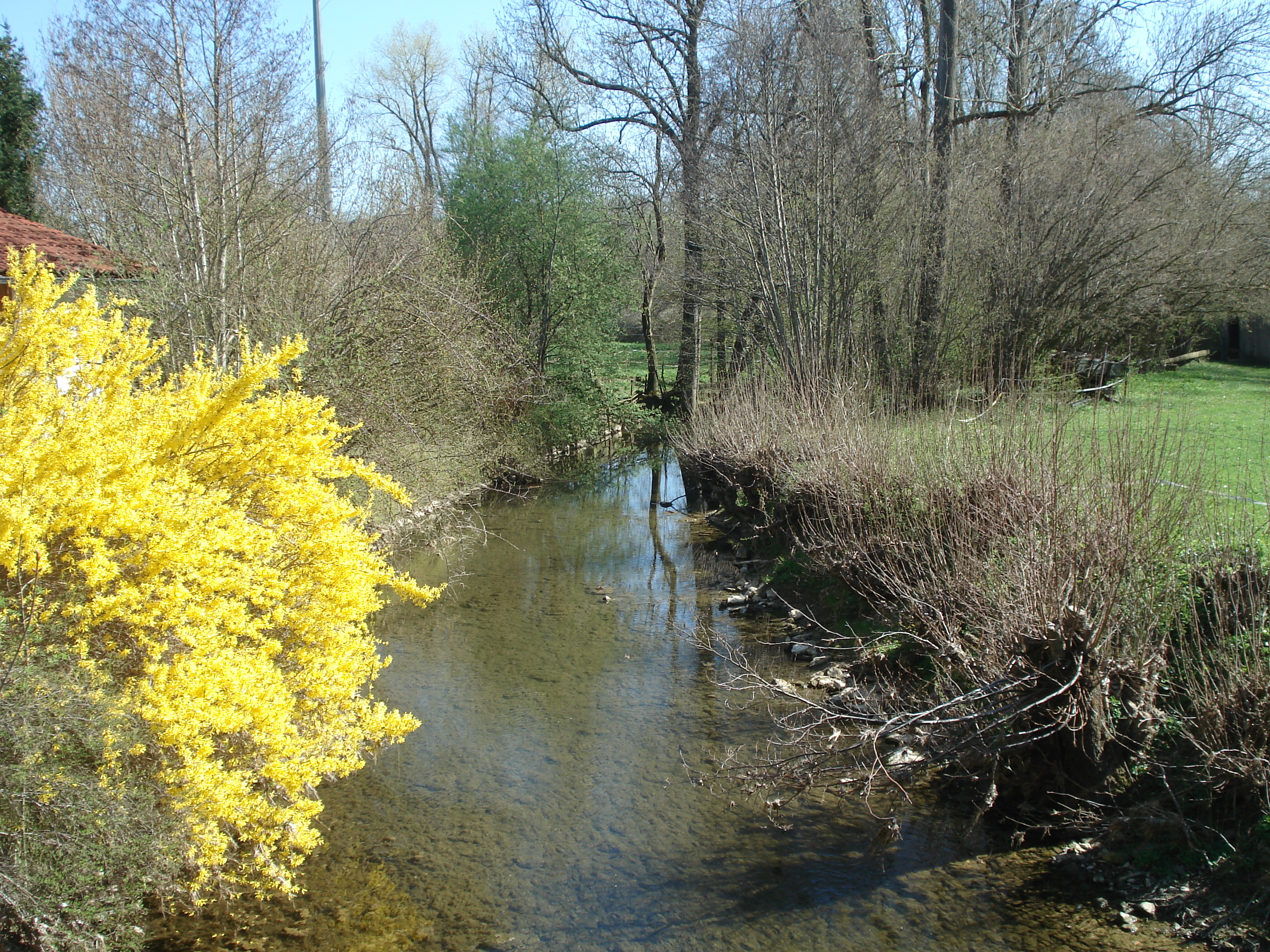 Die Schandtauber in Bettenfeld